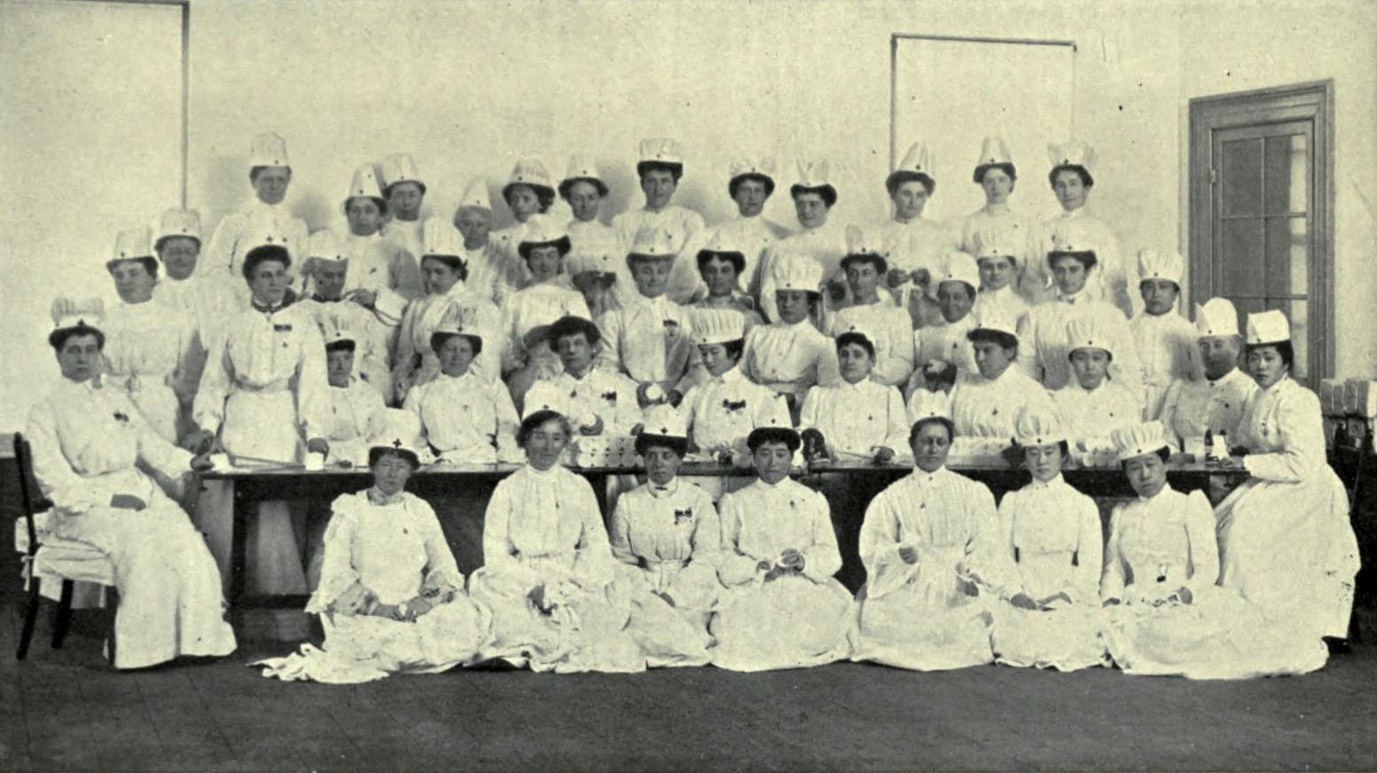 赤十字病院の梨本伊都子